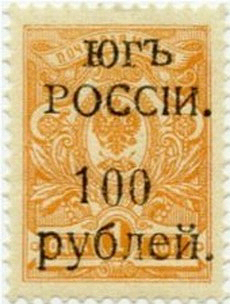 Почтовая марка Главного командования ВСЮР пятого выпуска, 1920